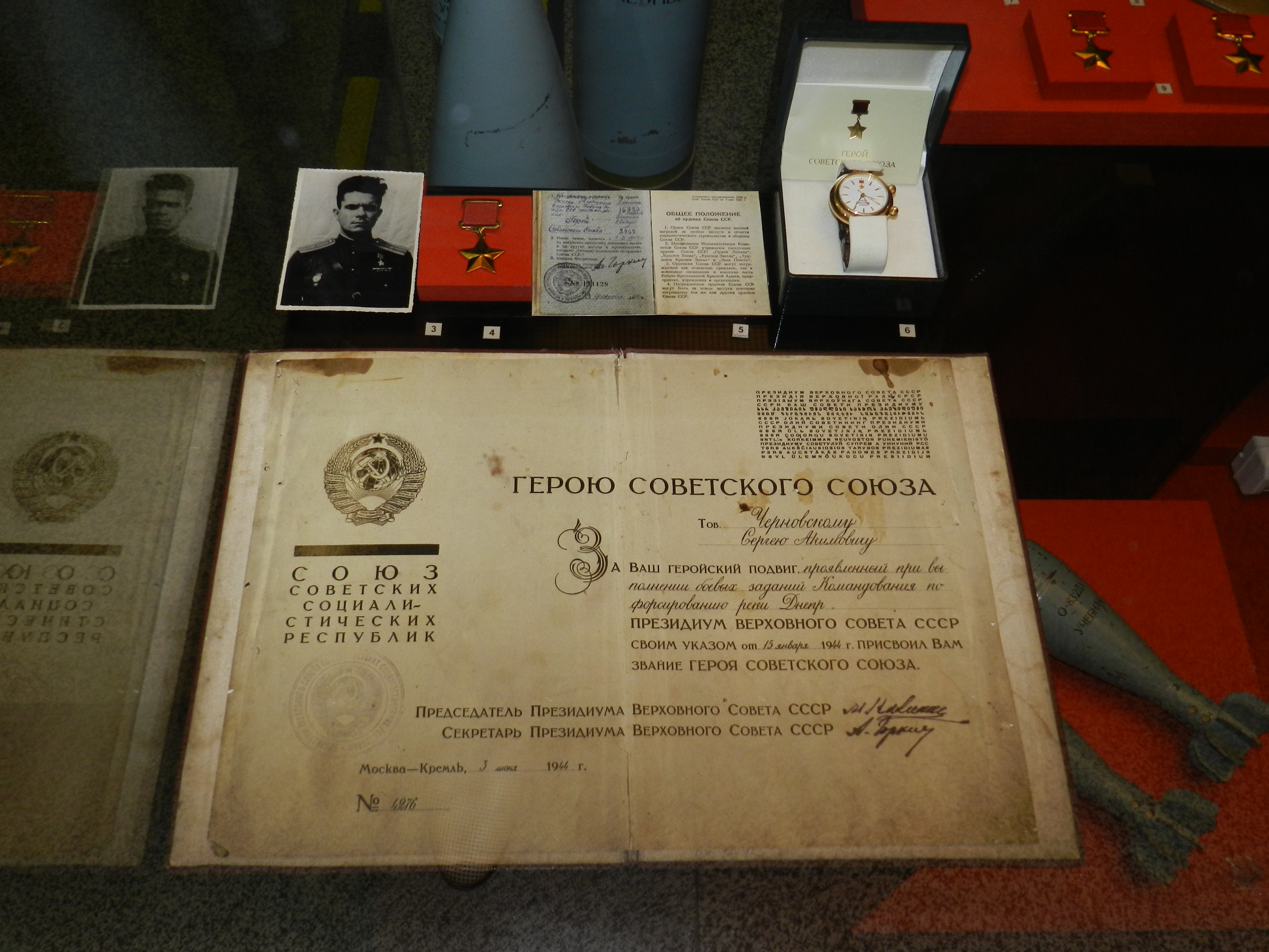 награды Черновского Сергея Акимовича в Центральном музее Великой Отечественной войны 1941-1945 гг. (Музее Победы) на Поклонной горе.